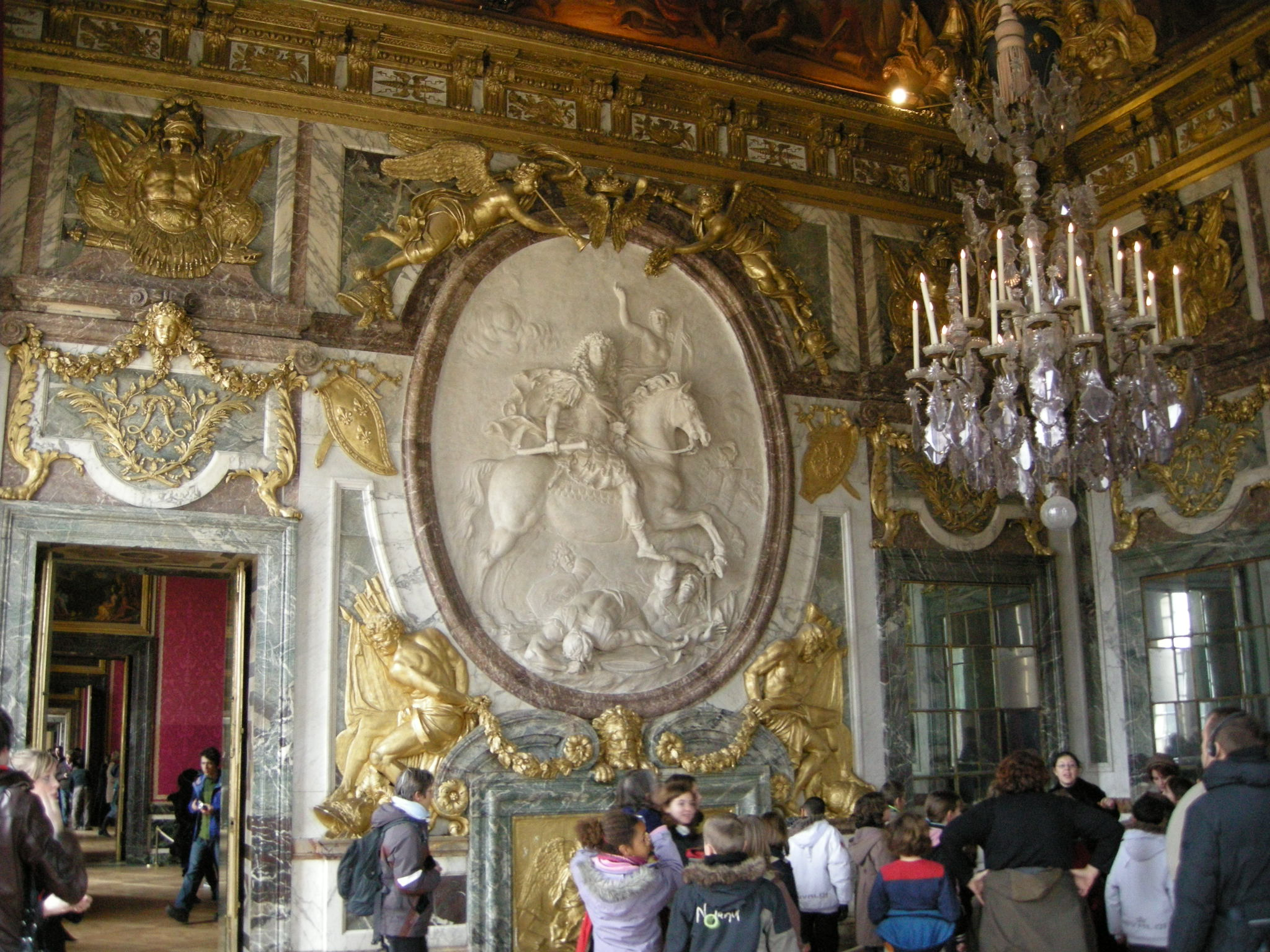 Le salon de la guerre, situé au nord de la galerie des glaces, dans le château de Versailles (Yvelines, France). La frise est ornée de peltes.